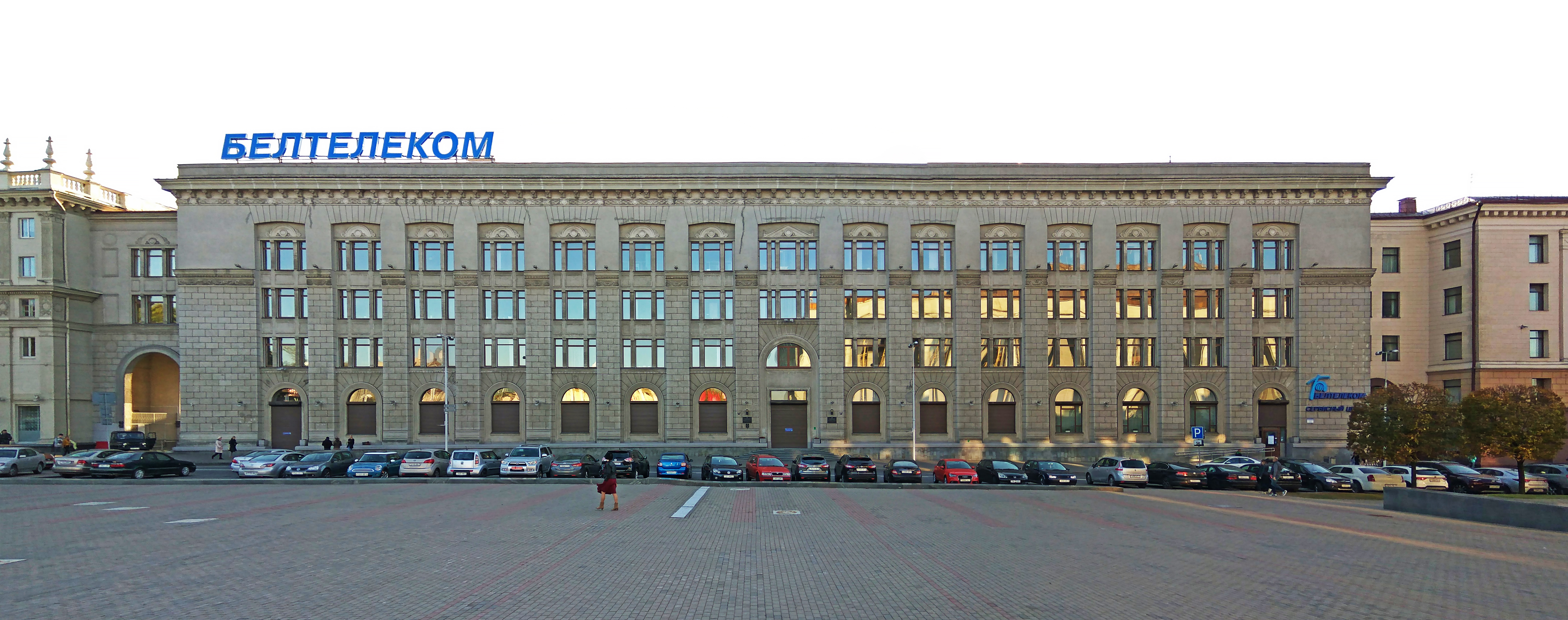 Мінск. Будынак Белтэлекама